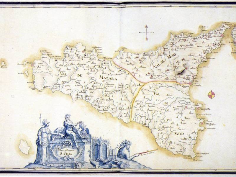 G. Fermenti, Isla y Reyno de Sicilia 1705. Disegno militare della Sicilia. Tratto da: Liliane Dufour, Antiche e nuove difese, Arnaldo Lombardi Editore Palermo - Siracusa 2000.